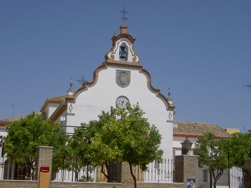 Iglesia en El Cuervo de Sevilla